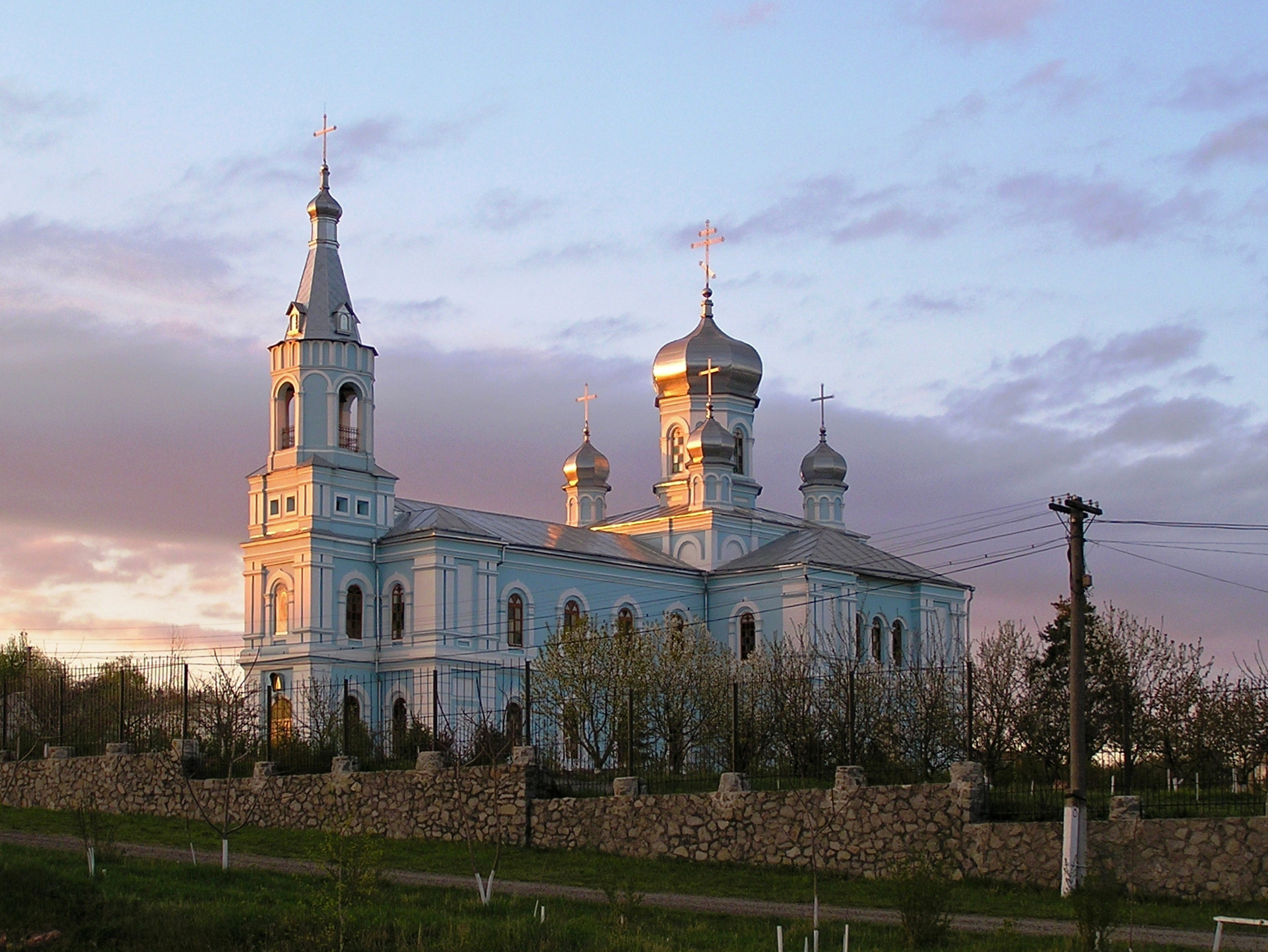 Архангело-Михайлівська церква 1880р., смт Краснокутськ Харківська обл.